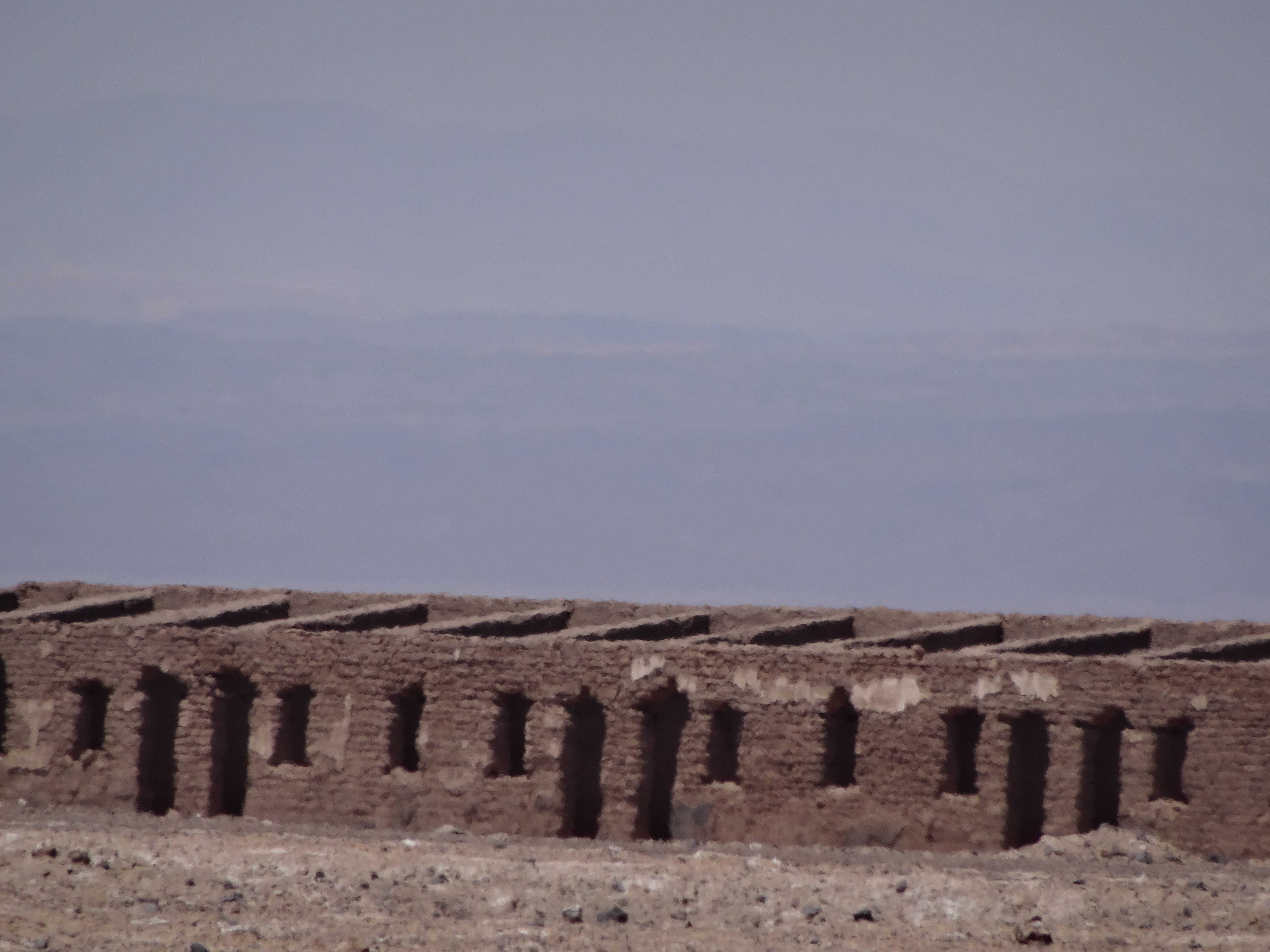 Detalle del frente de un inquilnato en la pampa salitrera del desierto de Atacama, Chile